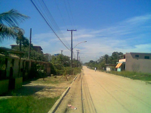 Foto da Rua José Eleotério, em Seropédica/RJ. Foto feita em frente a Igreja Nossa Senhora Aparecida.